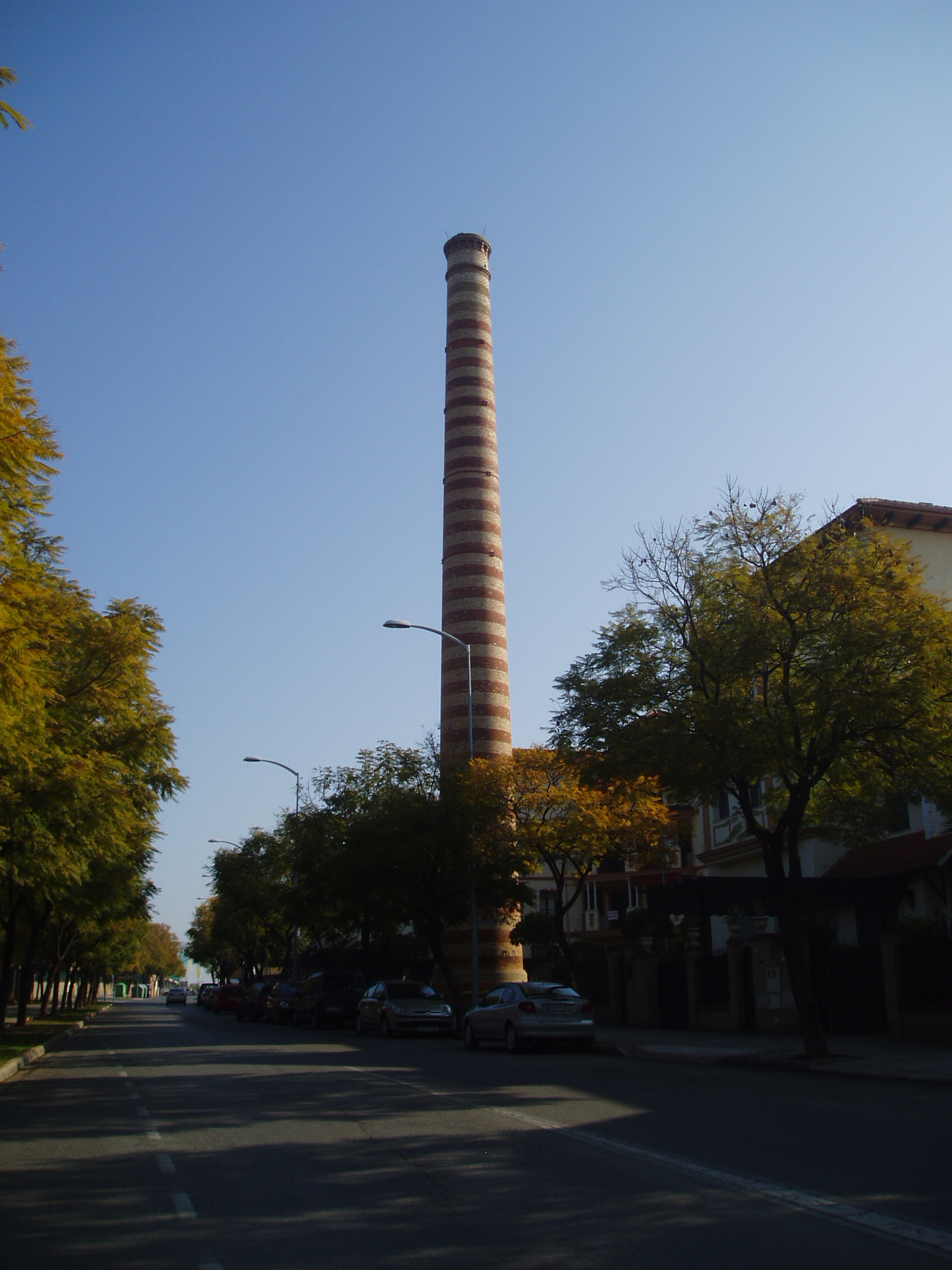 Chimenea de la antigua fábrica de hilados de yute. Es punto geodésico de la cartografía del ejercito español